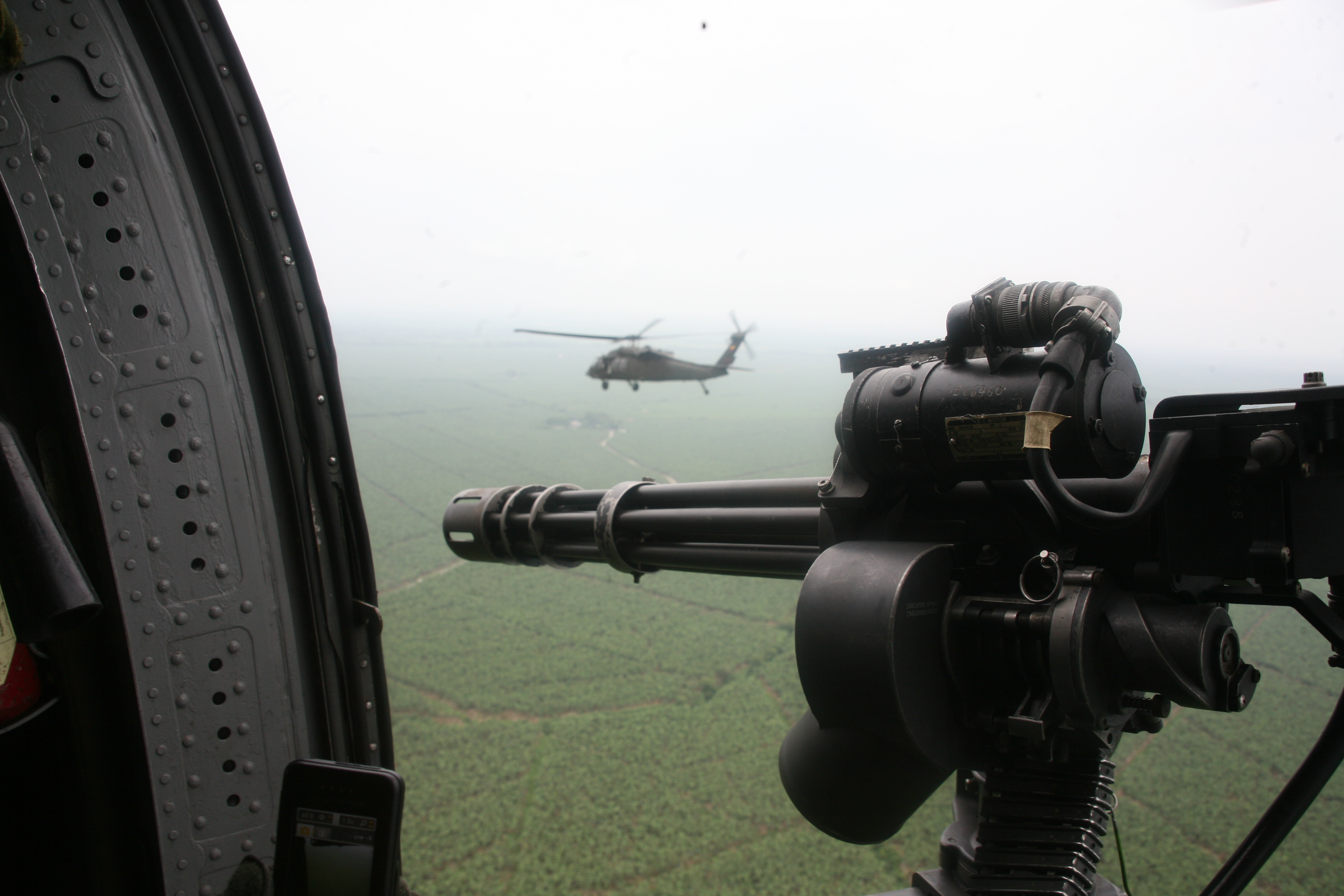 CAPTURA ALIAS DON MARIO 009